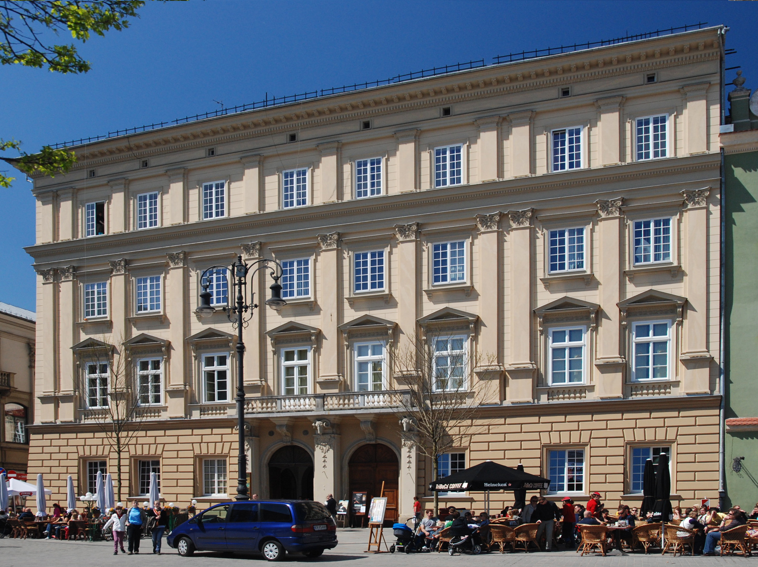 Pod Baranami. Kraków